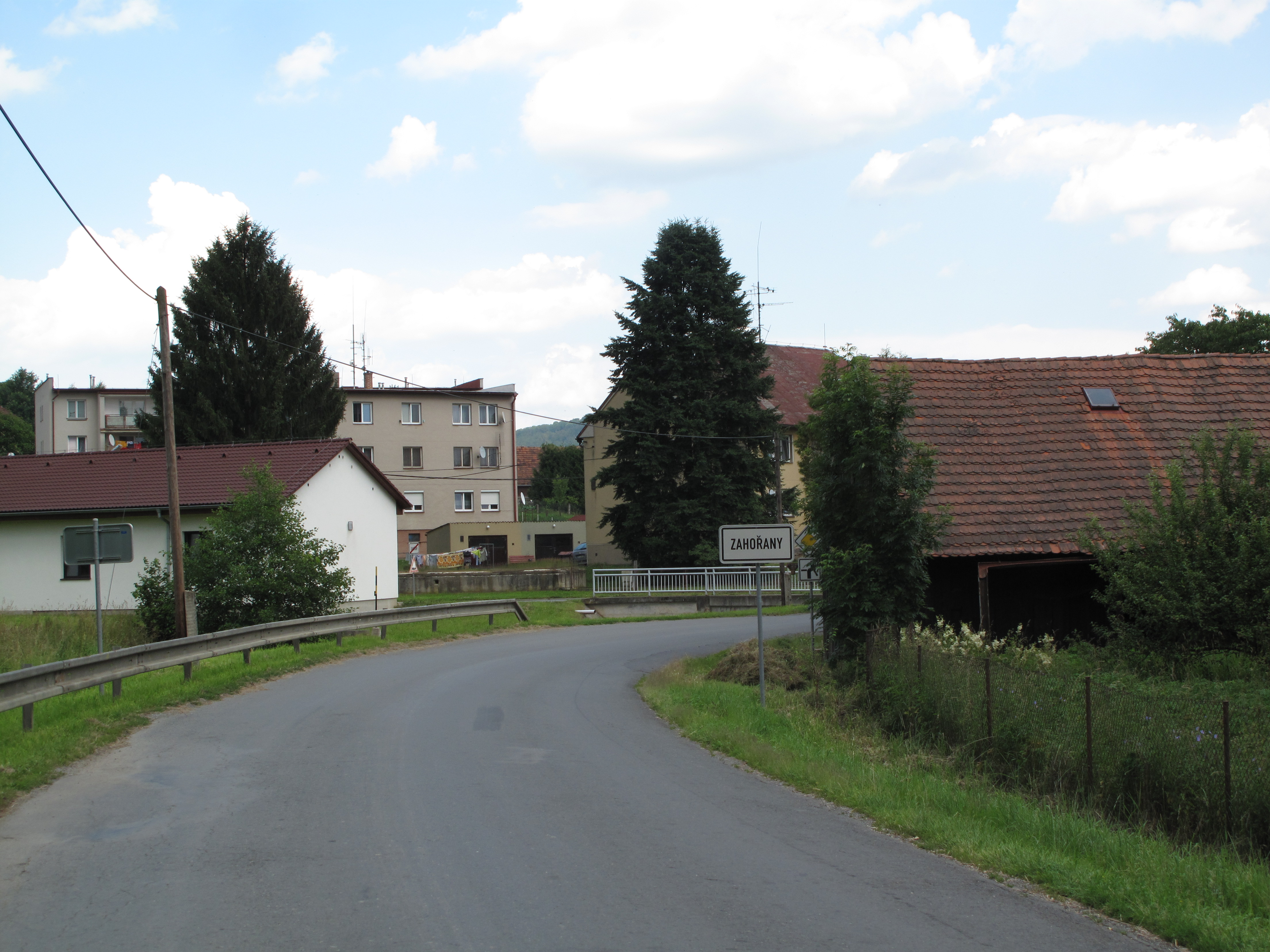 Zahořany, okraj vesnice